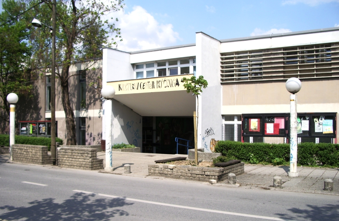 Kulturni centar Pešćenica u Zagrebu